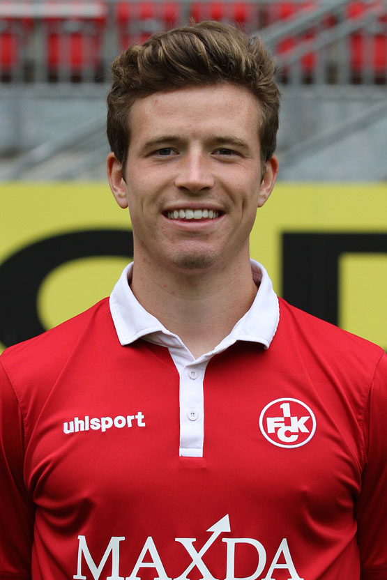 Patrick Ziegler